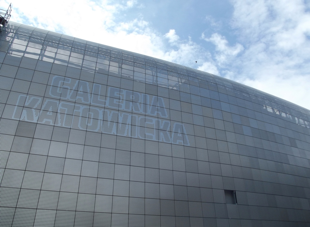 Zdjęcie zrobione podczas IV etapu 70. jubileuszowego Tour de Pologne w Katowicach.